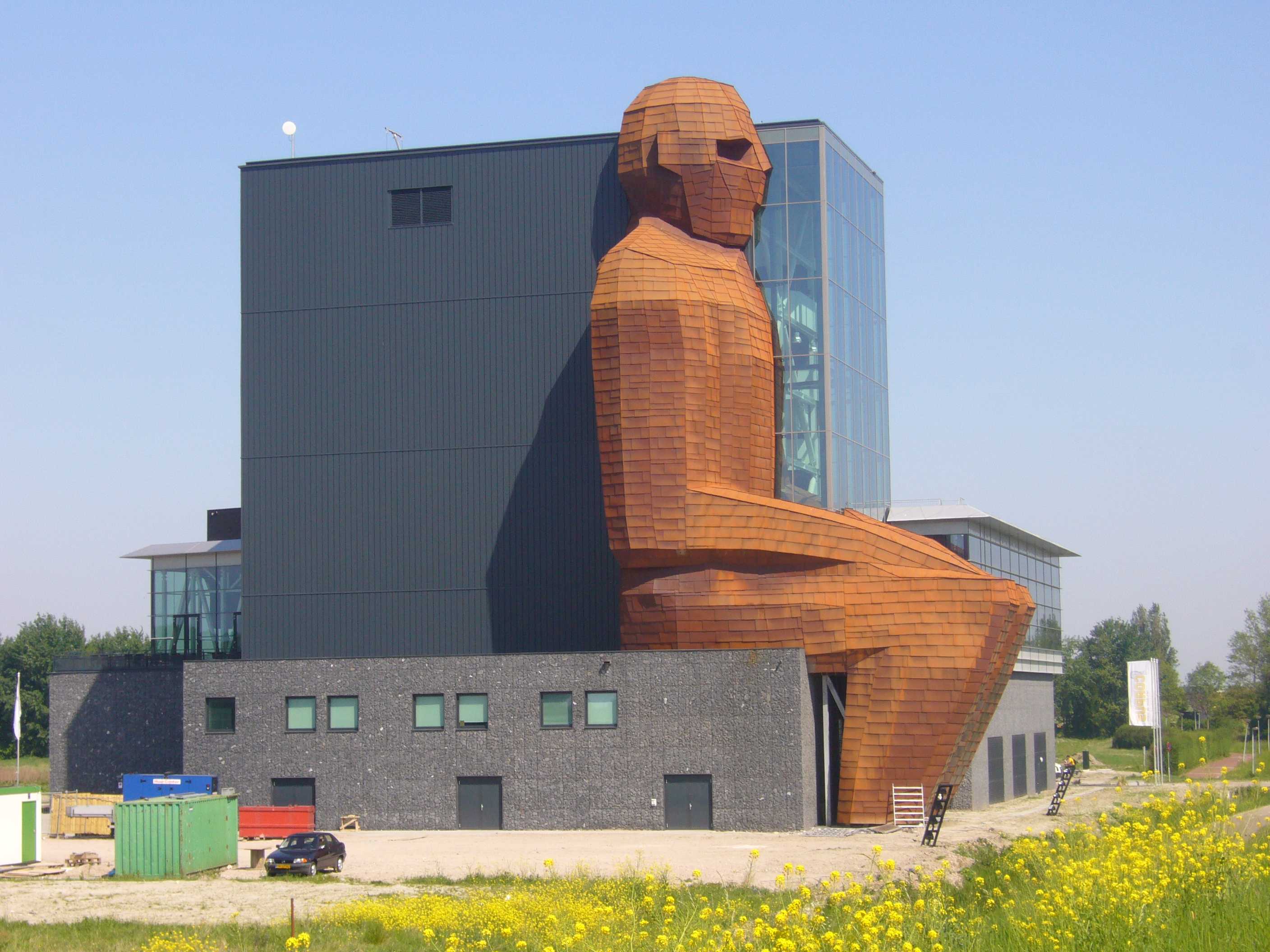 CORPUS, aan de A44